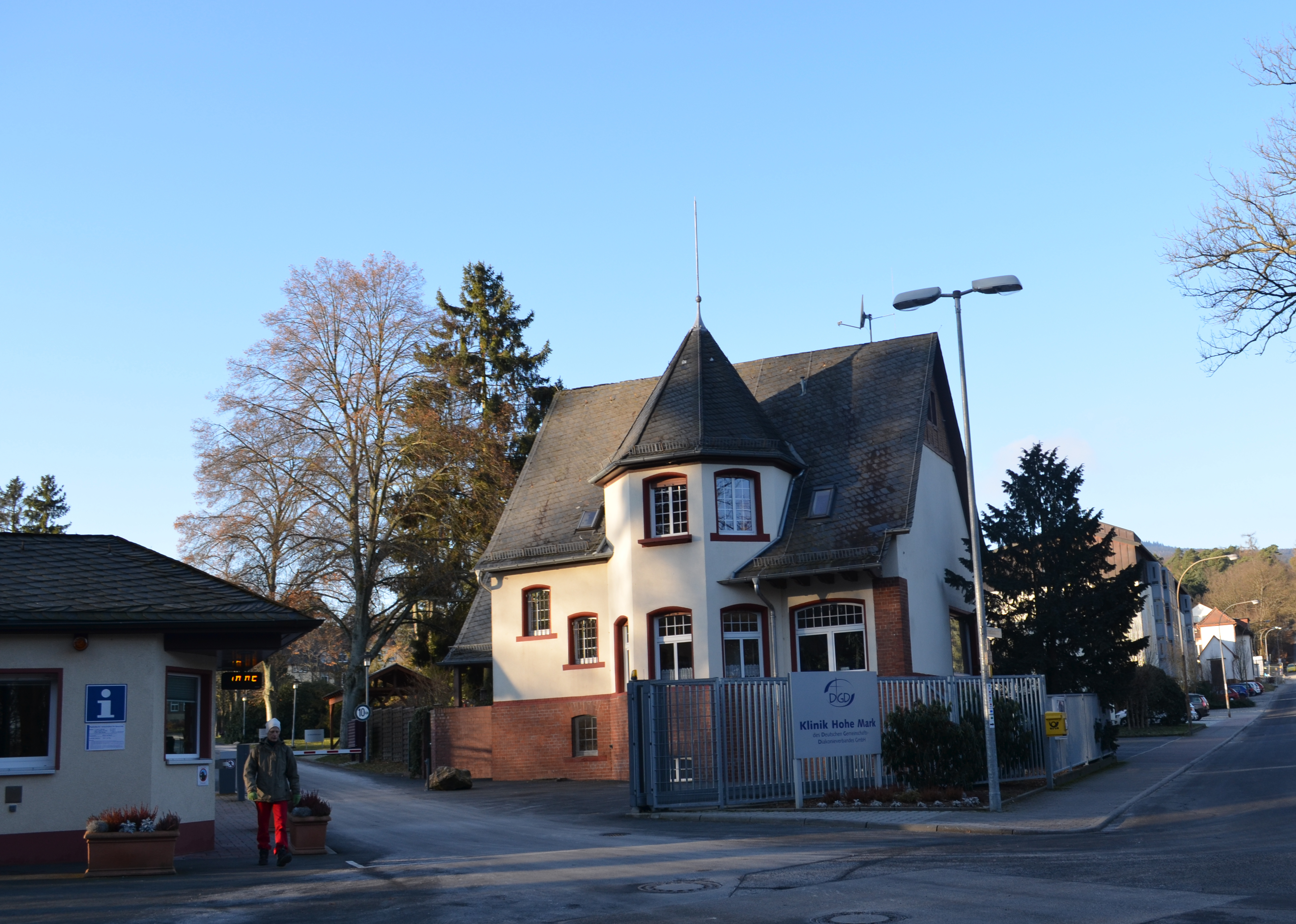 Oberursel, Klinik Hohemark, Eingang